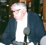 Henri Troyat, de l'Académie française.